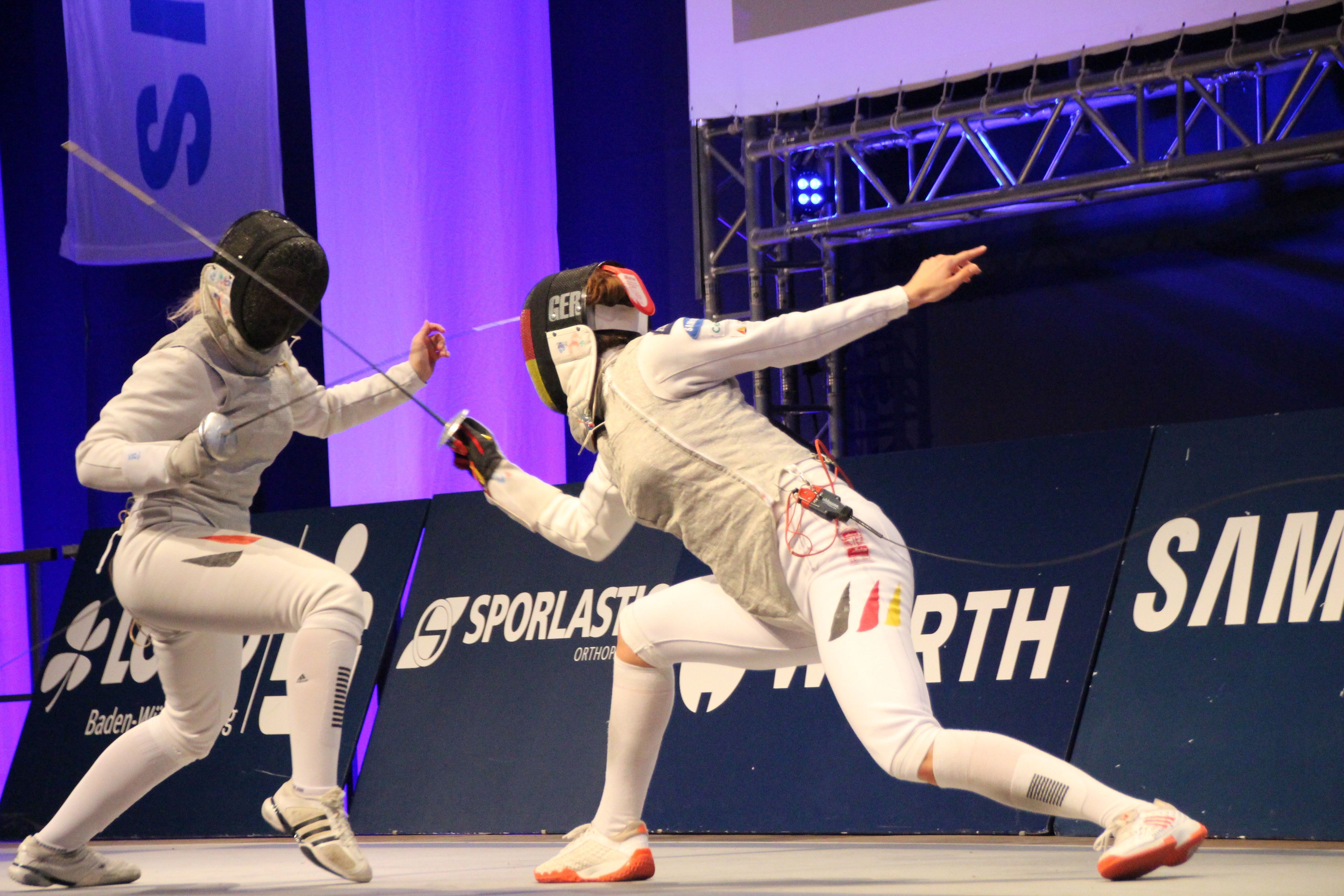 DeuDeutsche Fechtmeisterschaften 2017 im Florett vom 25. bis 26. März 2017 im Olympiastützpunkt Tauberbischofsheim beim Fecht-Club Tauberbischofsheim